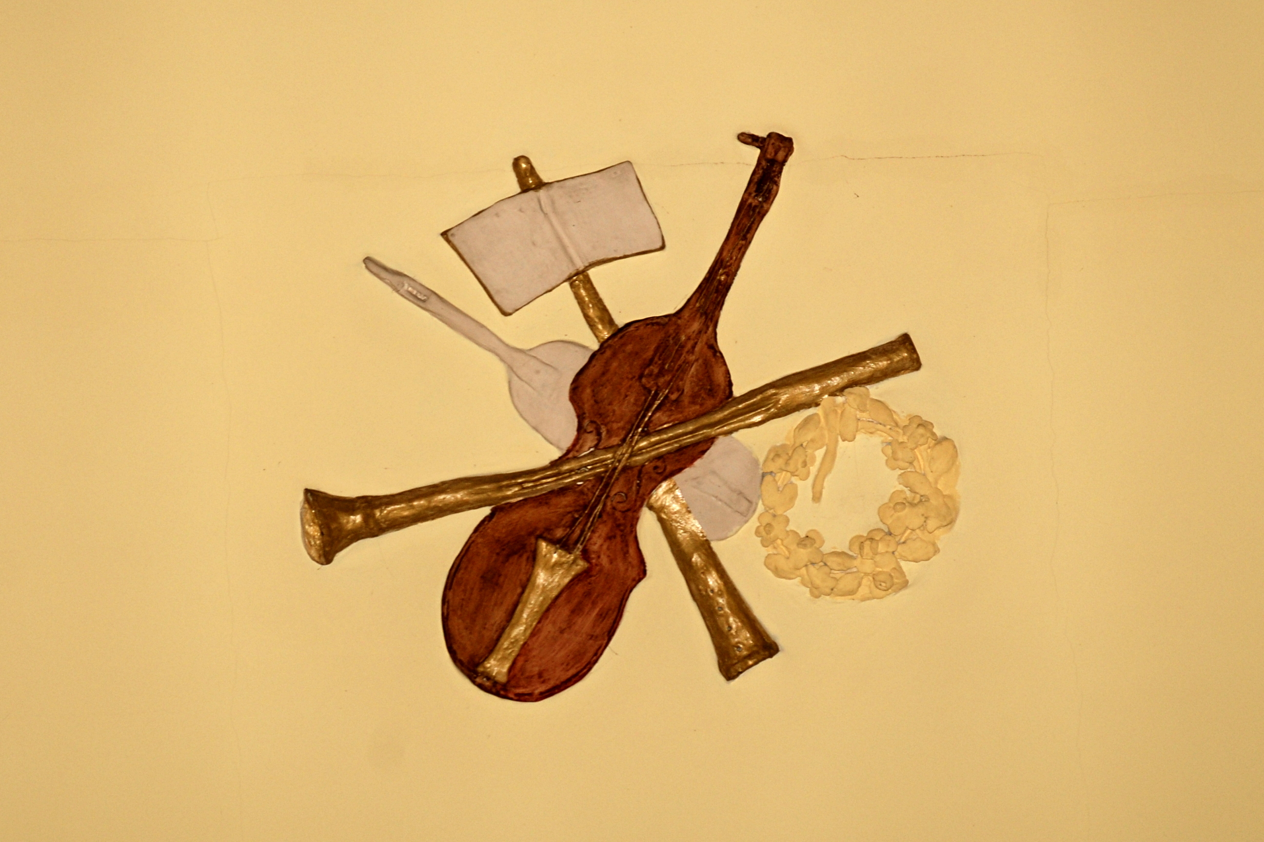 Belgique - Brabant wallon - Mont-Saint-Guibert - Église Saint-Guibert